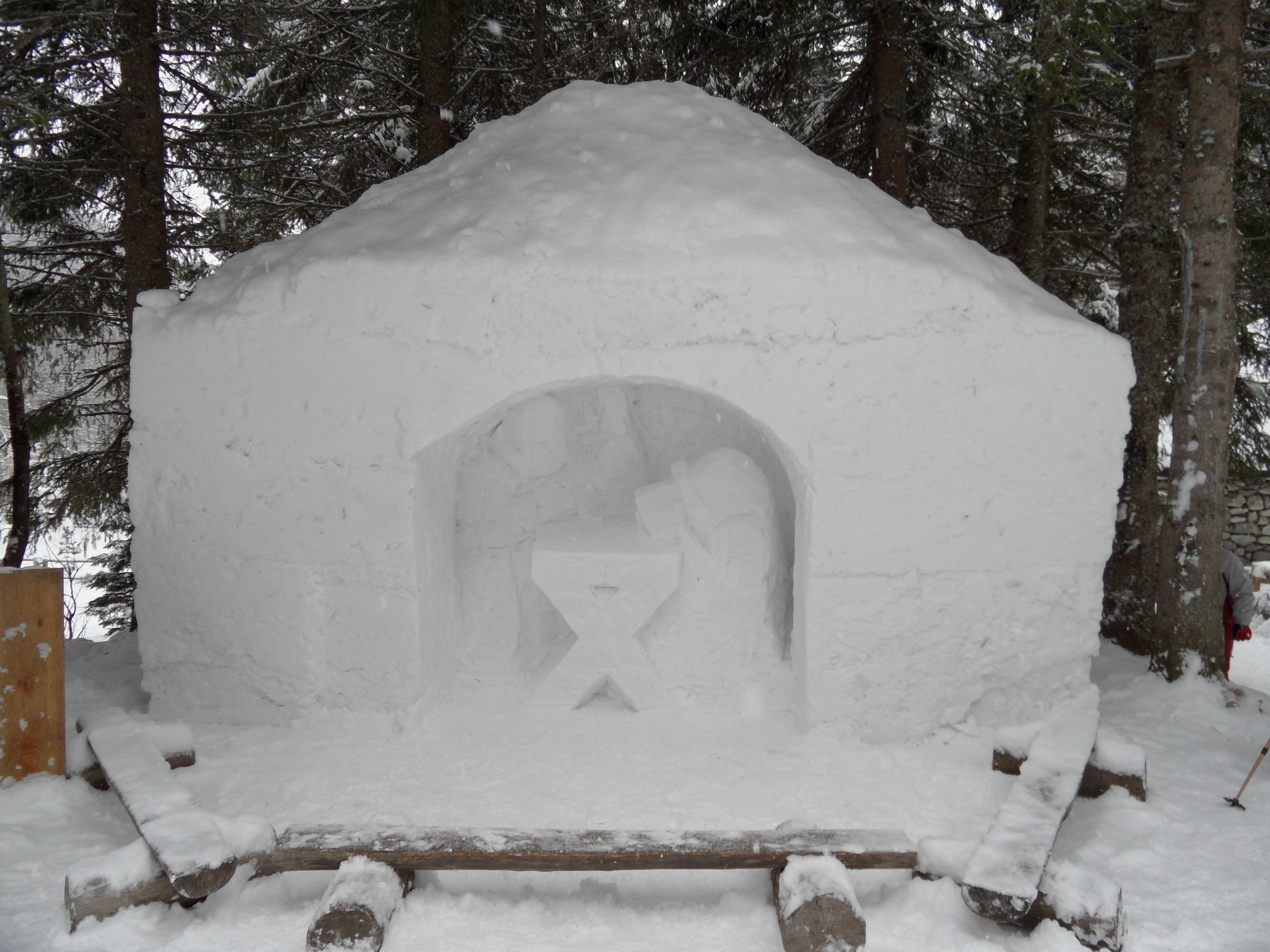 Ešte nedokončený snehový betlehem Petra Petrasa pri Rainerovej chate.